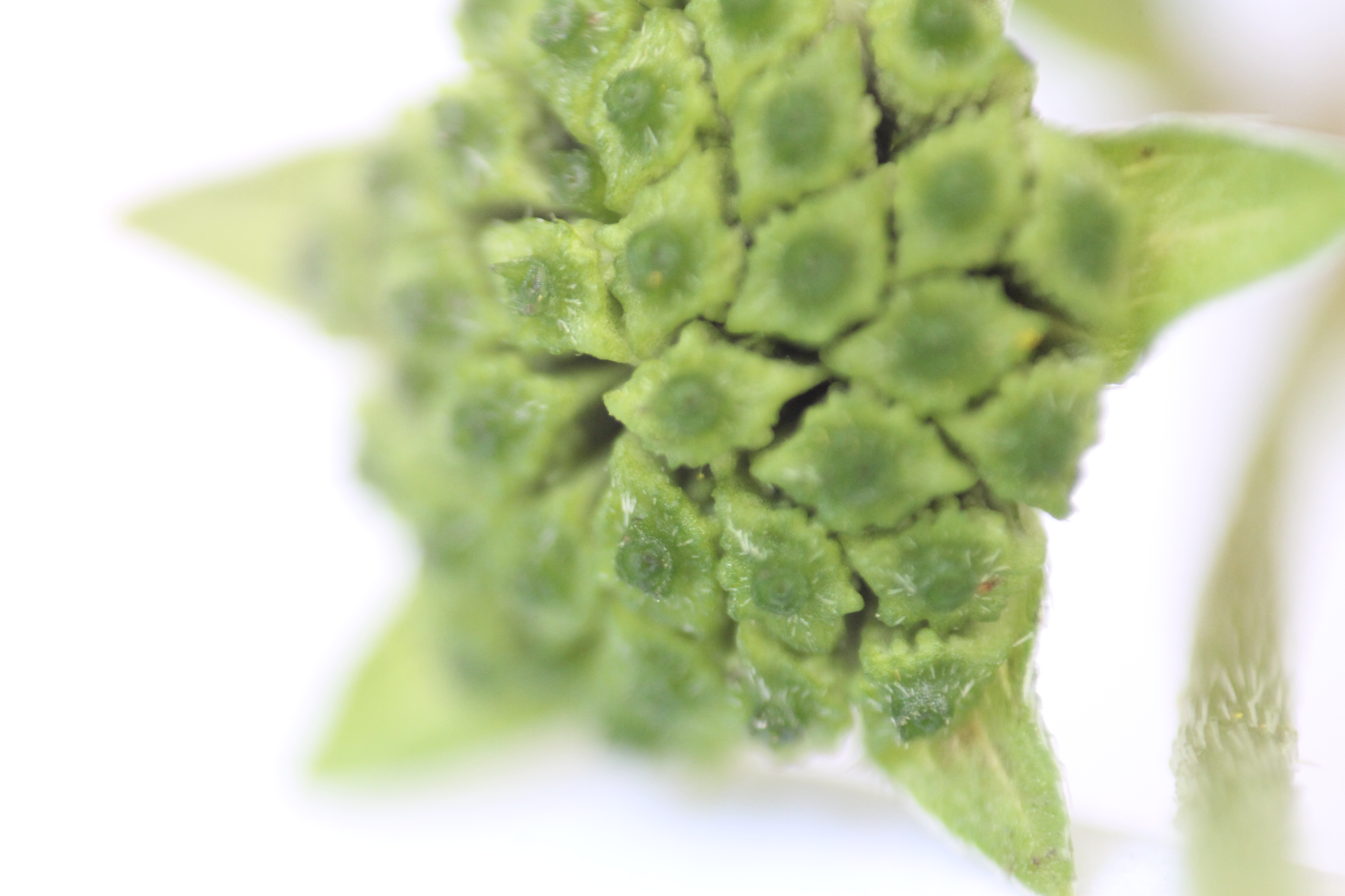 കയ്യോന്നിയുടെ വിത്ത്